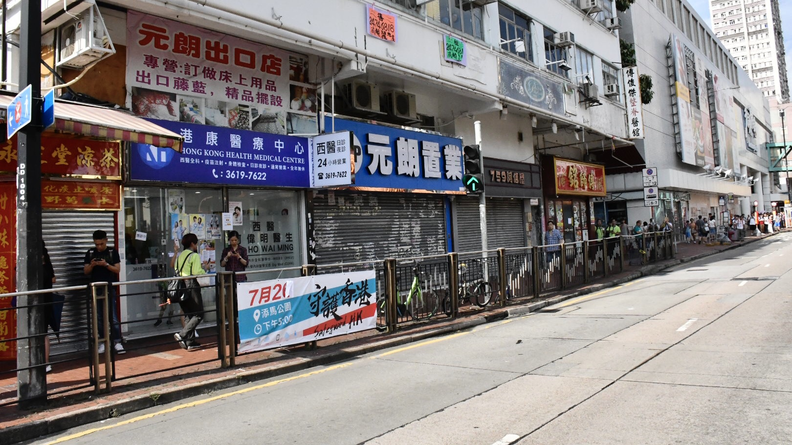 中文（中国大陆）: 7月22日下午，受網上流傳再有黑幫刀手施襲的消息影響，元朗市面約九成店舖關門，途人和車輛稀少，有如死城。